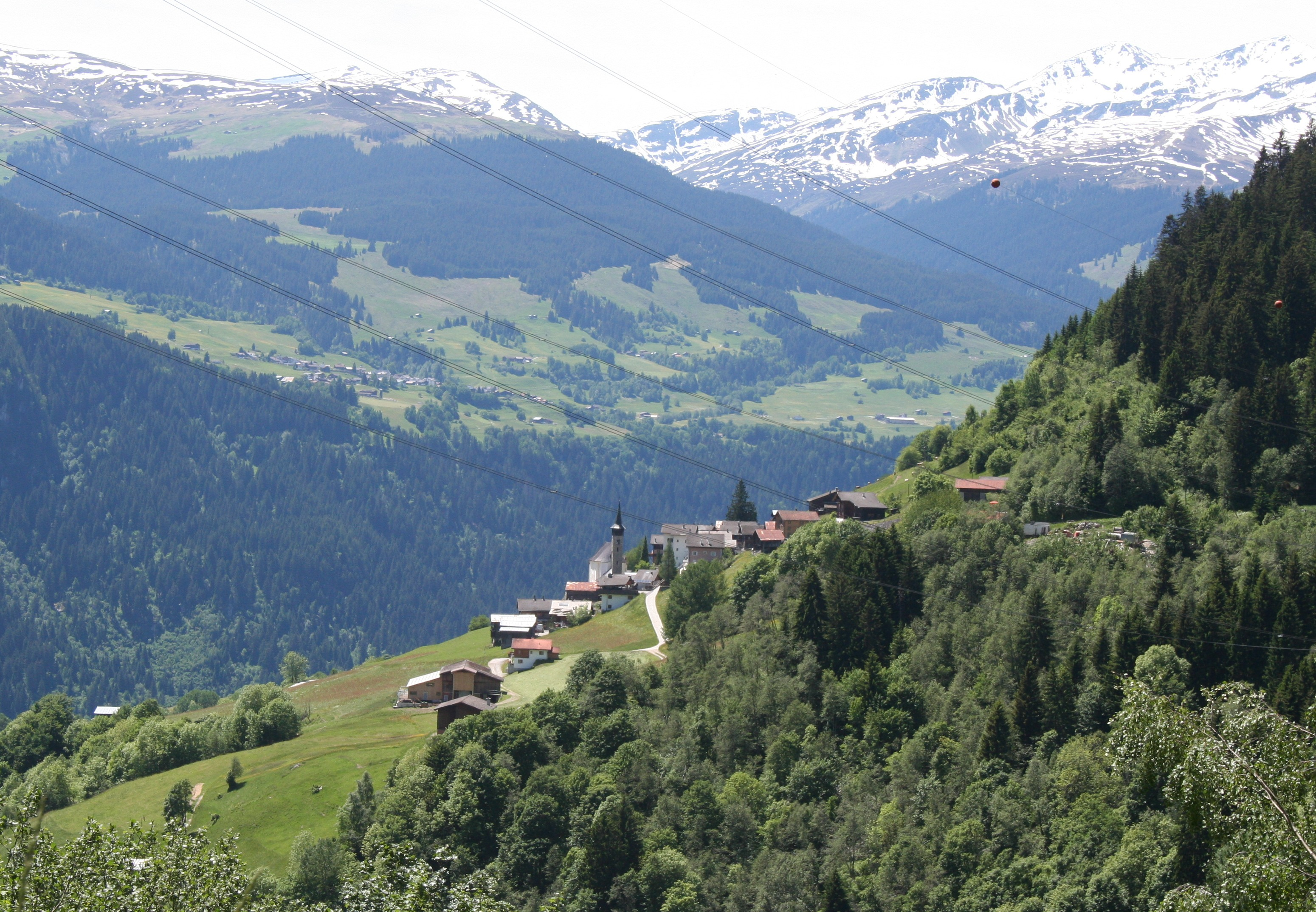 de:Andiast